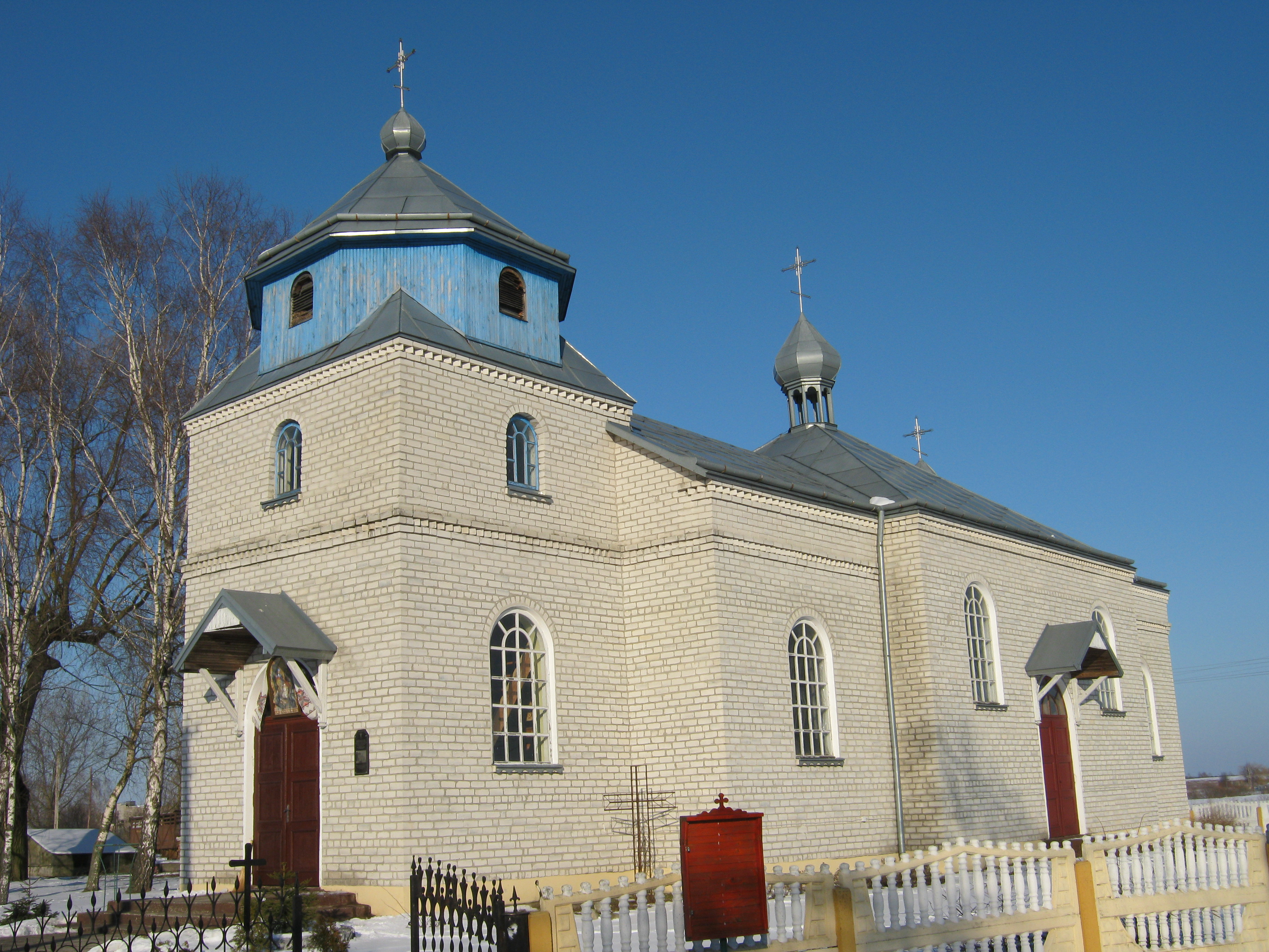 Церква